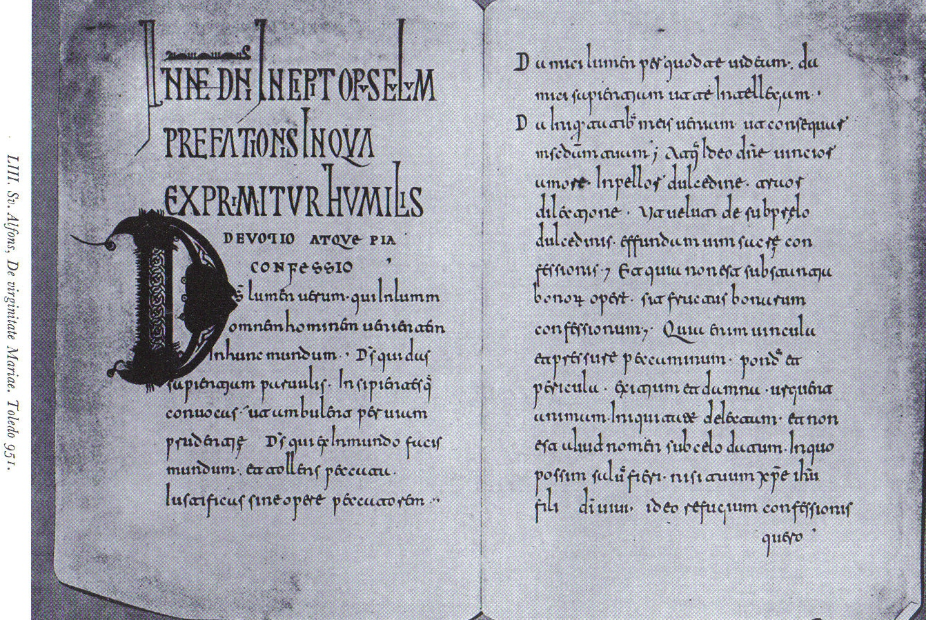 Česky: De virginitate Mariae z roku 951 od sv. Alfonse, biskupa v Toledu